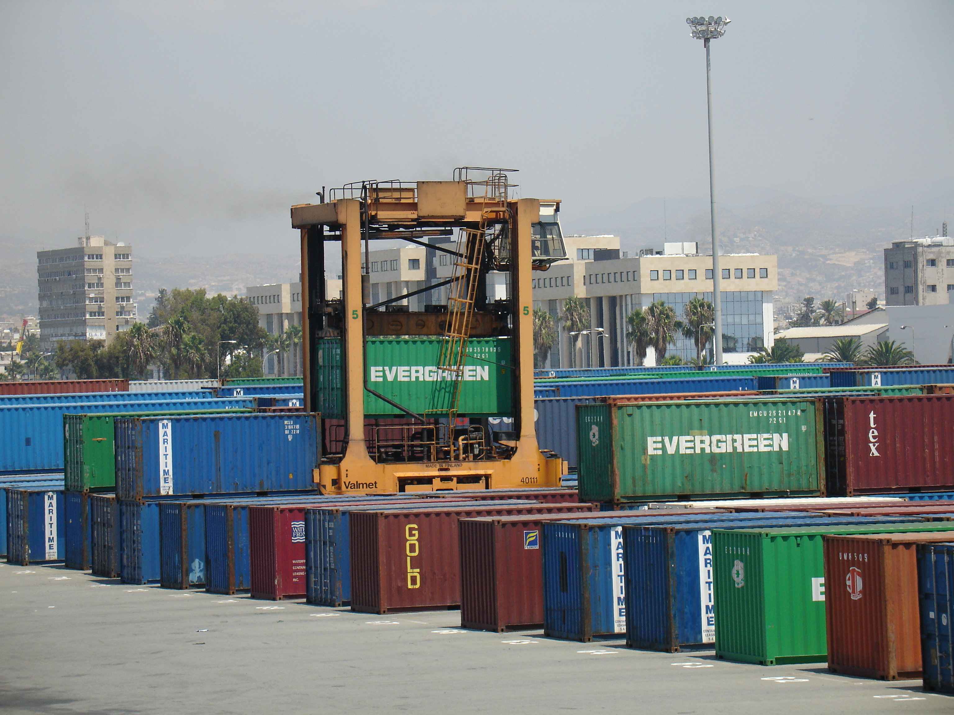 Straddle Carrier